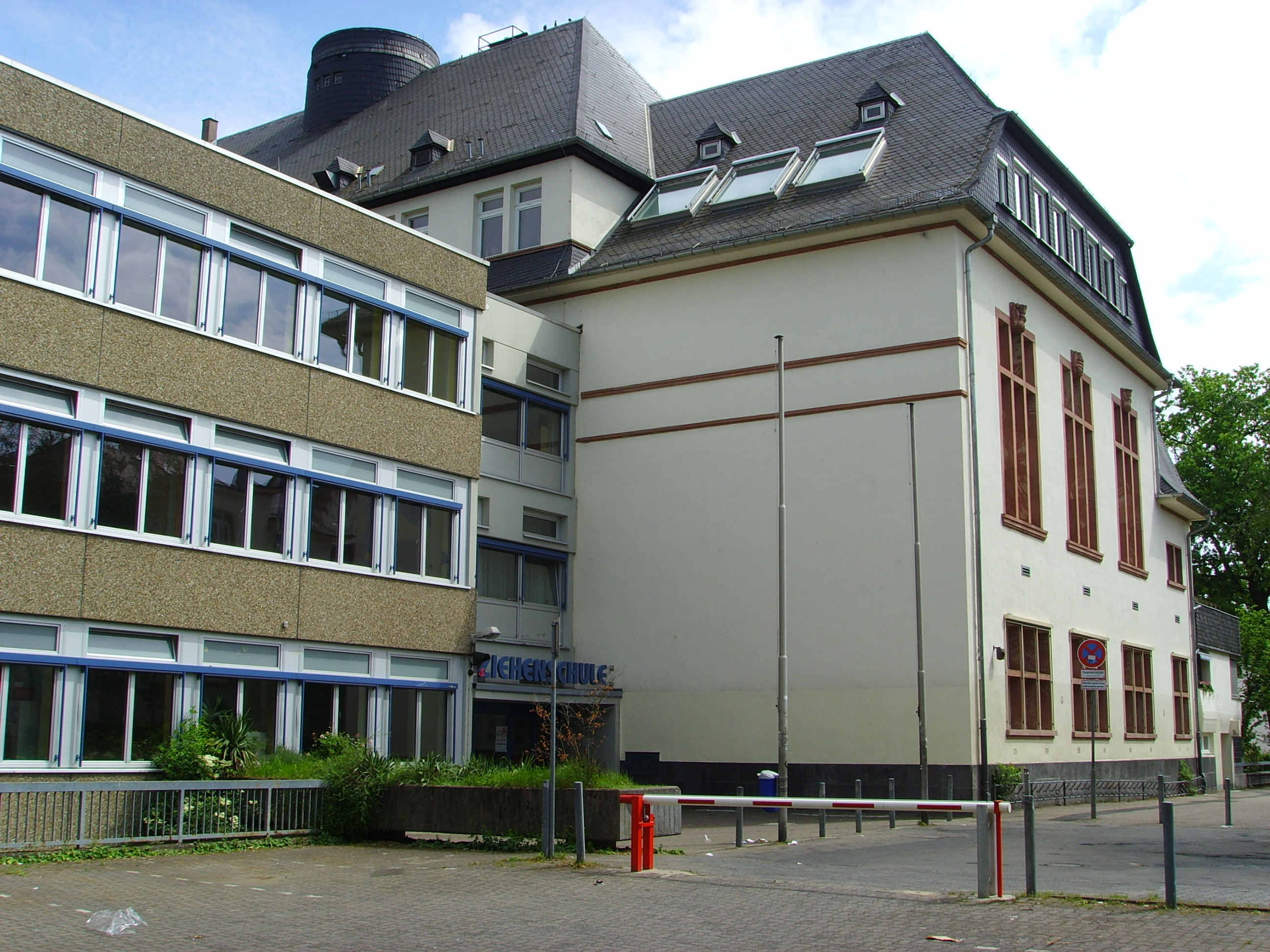 Ziehenschule in Frankfurt am Main, Haupteingang zwischen Neubau und Altbau